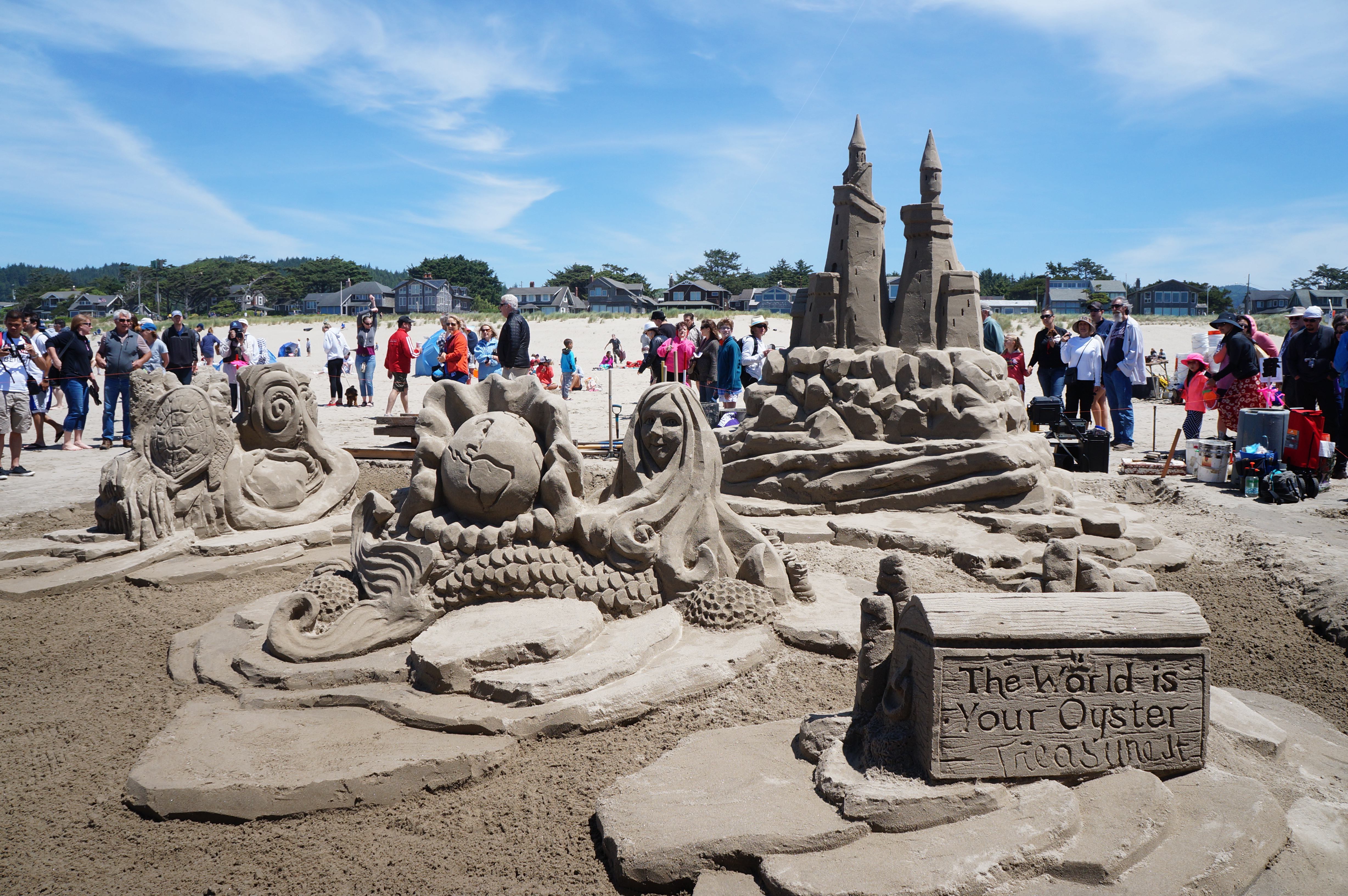 Sand sculptures